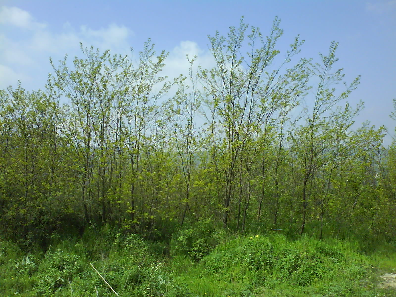 Această poză reprezintă nişte puieţi de salcâm plantaţi de locuitori, pentru a împăduri o carieră de piatră.